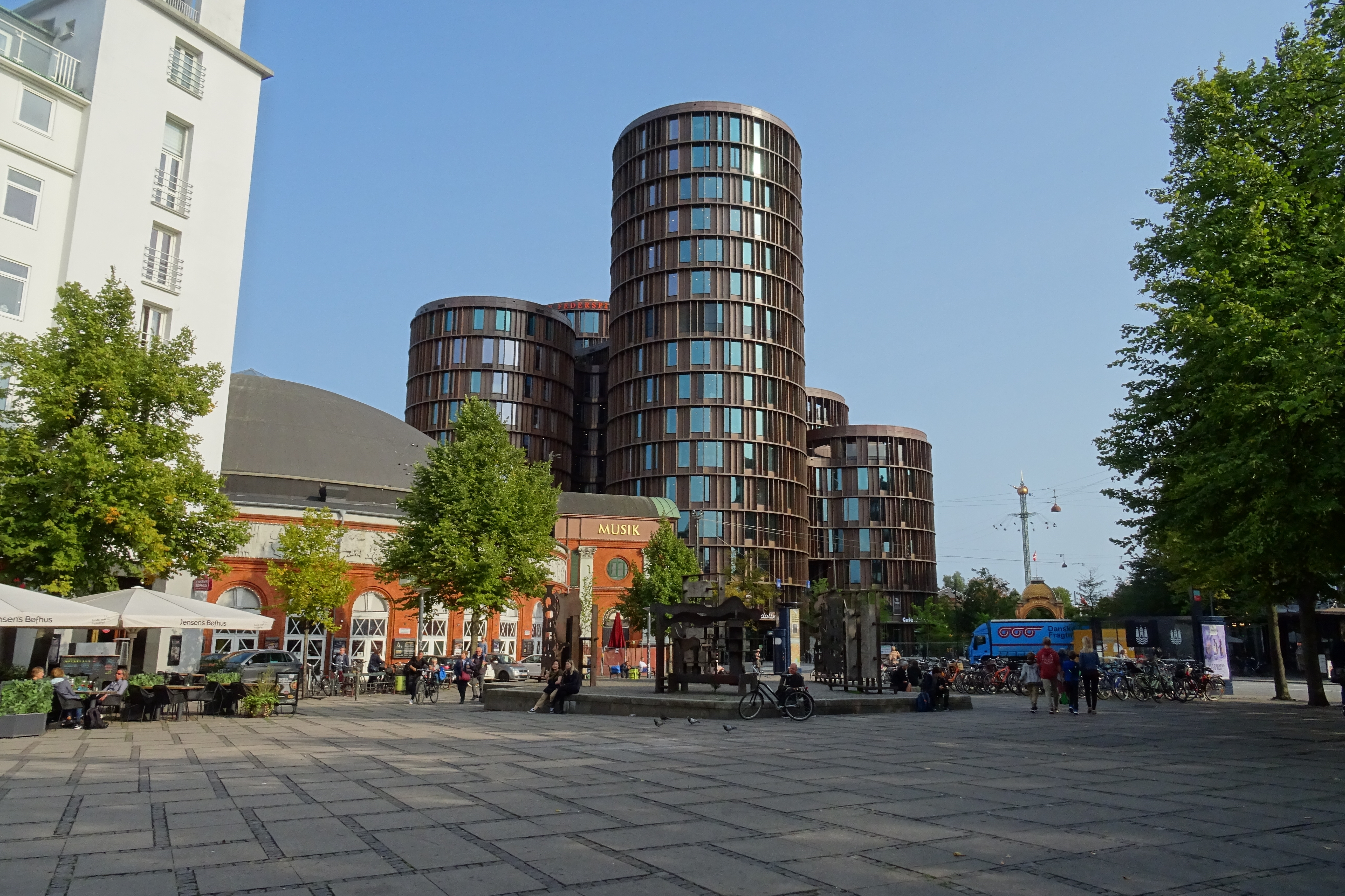 Axel towers in Copenhagen, Denmark